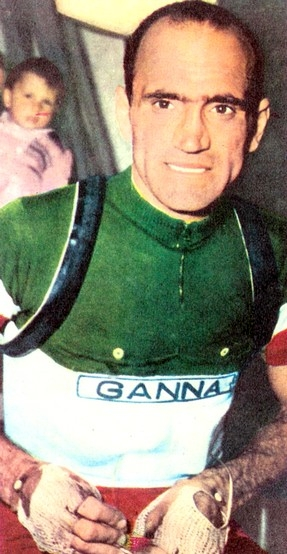 Il ciclista Fiorenzo Magni.